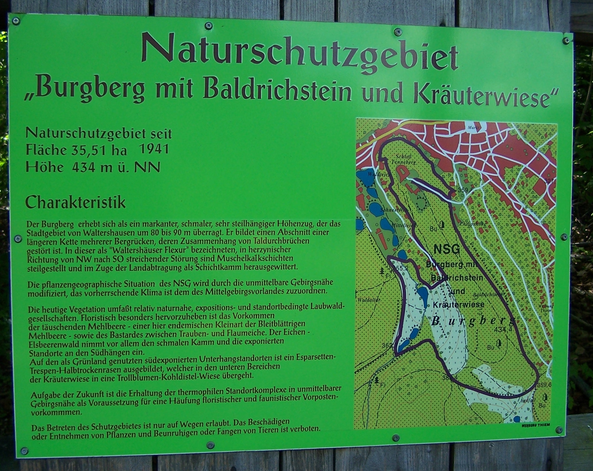 Infotafel zum NSG Burgberg